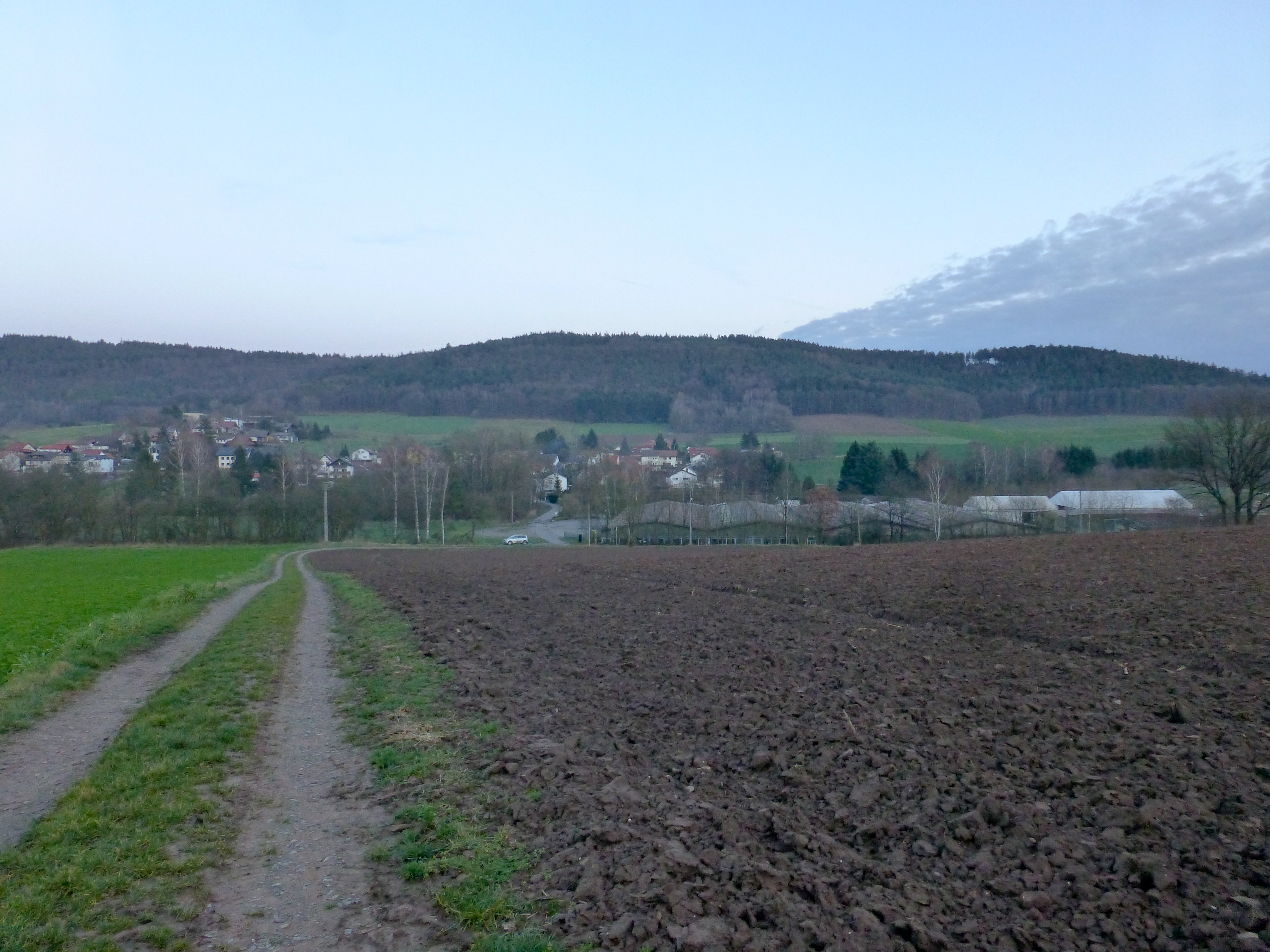 Der Spessartskopf bei Wahlen im Odenwald